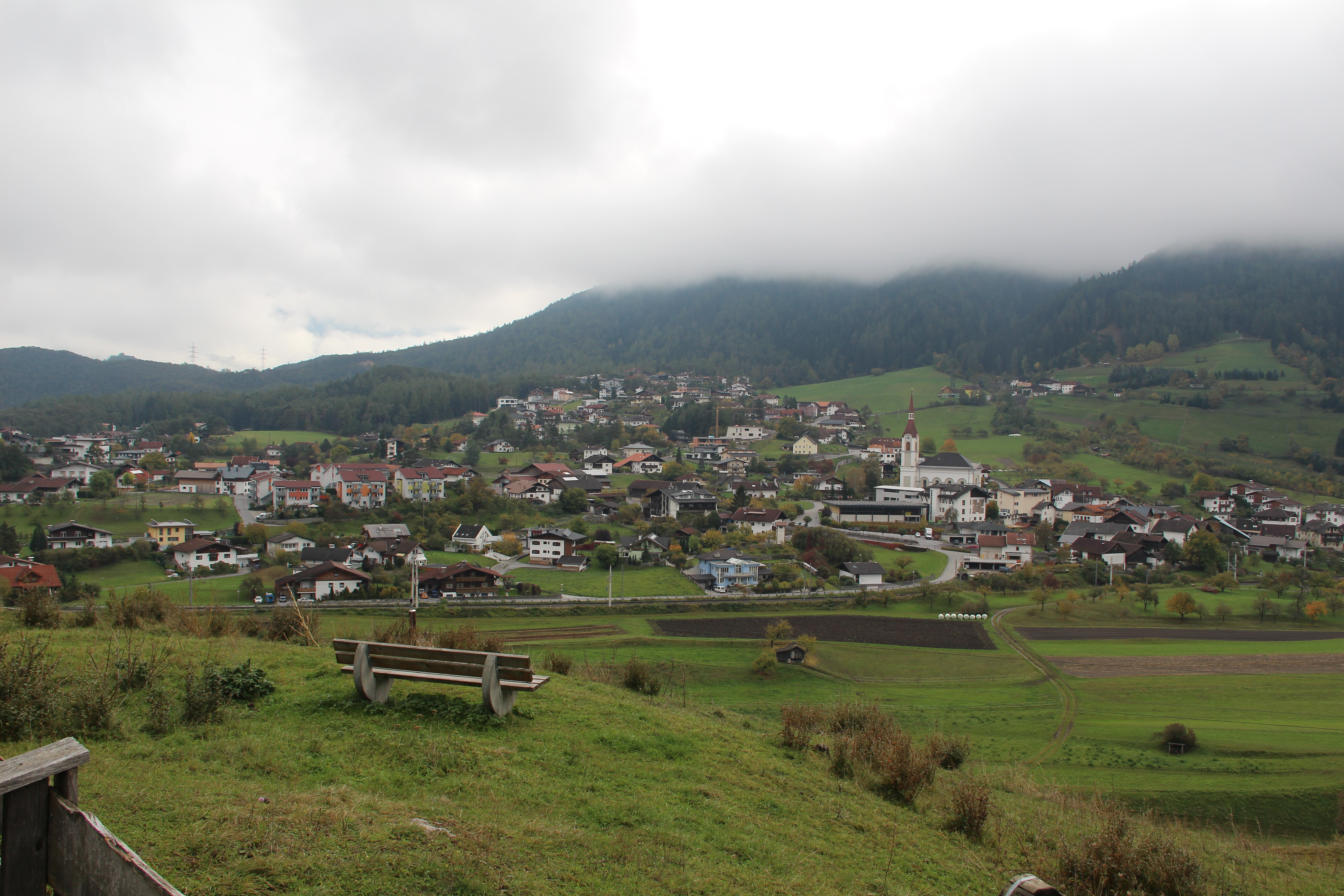 Ortsansicht von Roppen von Westen aus gesehen (Anhöhe Freinlekapelle)